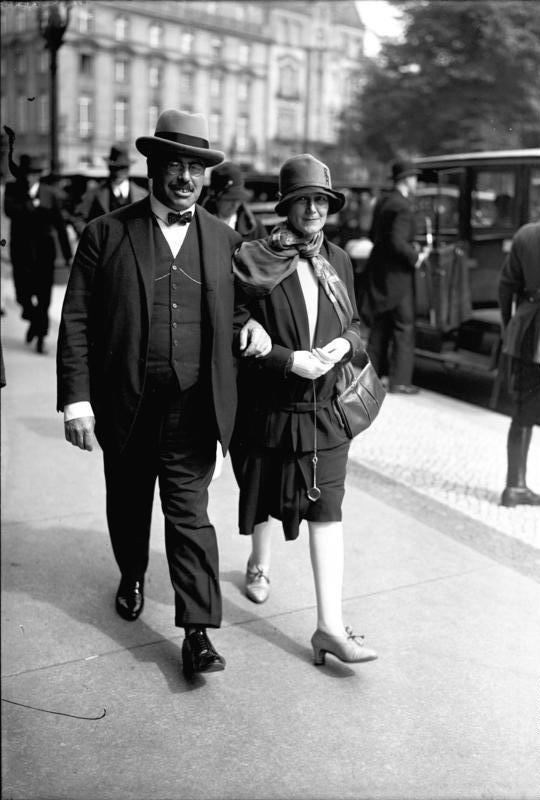 Interessante Politiker auf dem Wege zum neuen Reichstag! Der sozialdemokratische Abgeordnete und voraussichtliche Finanzminister Hilferding begibt sich mit seiner Gattin zum Reichstag.